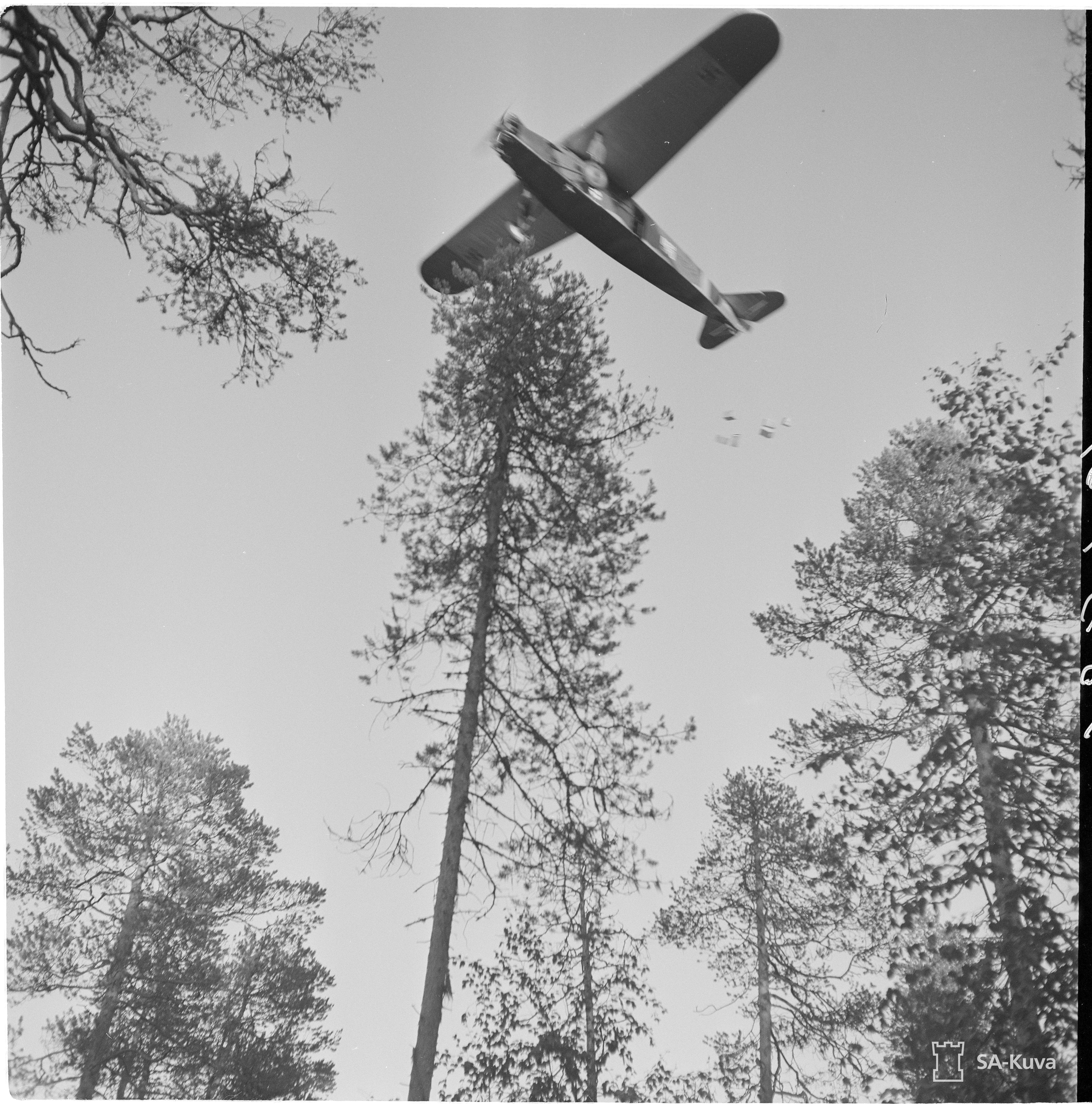 Lentokone pudottaa muonaa. (Kuvassa on Fokker F.VIII)